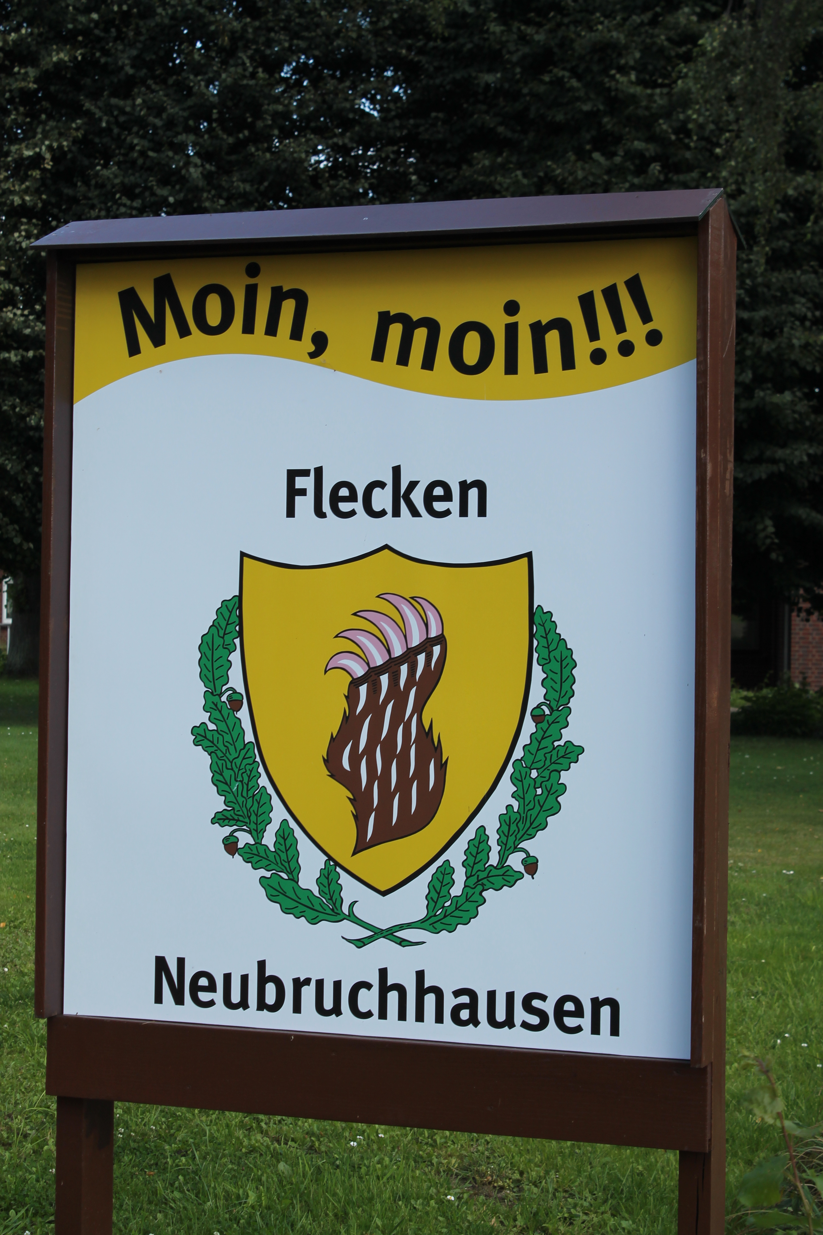 Begrüßungstafel am Ortseingang Neubruchhausen.